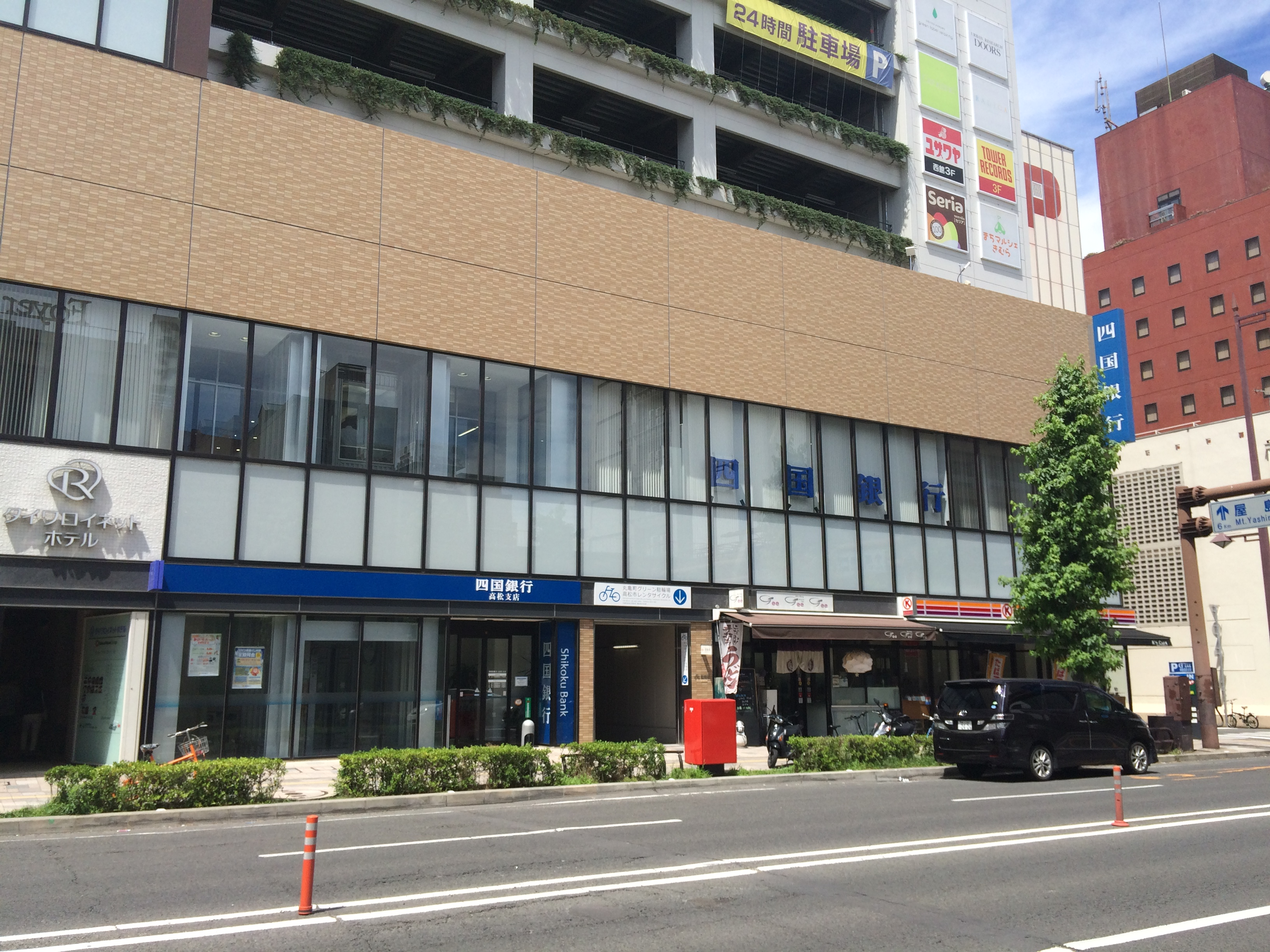 香川県高松市丸亀町8番地23にある四国銀行高松支店。 沿革 1950年（昭和25年）6月1日 - 高松市東瓦町4番地1に開設。 1958年（昭和33年）7月11日 - 戦災復興土地区画整理（第一工区一次）事業により高松市瓦町一丁目1番地に所在地名変更。 1973年（昭和48年）9月25日 - 店舗新築。 2010年（平成22年）5月6日 - ビル工事のため高松市紺屋町9番地6 高松大同生命ビル1階の仮営業所に移転。 2012年（平成24年）5月7日 - 現在地に新築移転。 （典拠：『四国銀行百年史』株式会社四国銀行百年史編集室編、株式会社四国銀行、1980年）